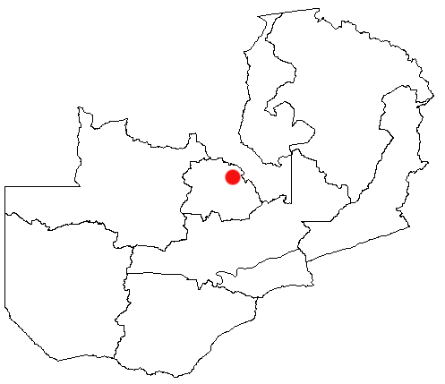 Kitwe, Zambia Location Map